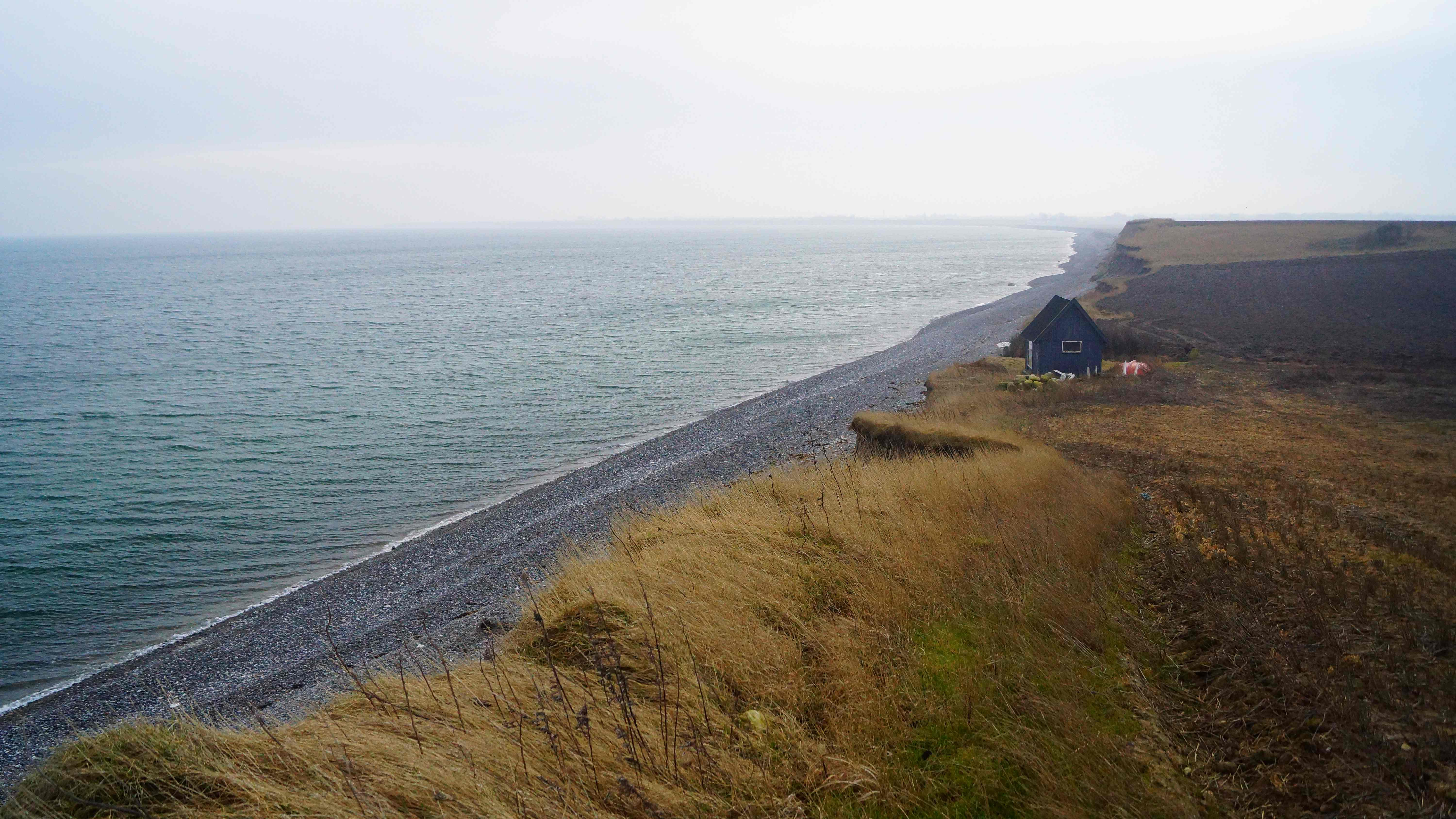 Gjerrild Klint, udsigt mod syd